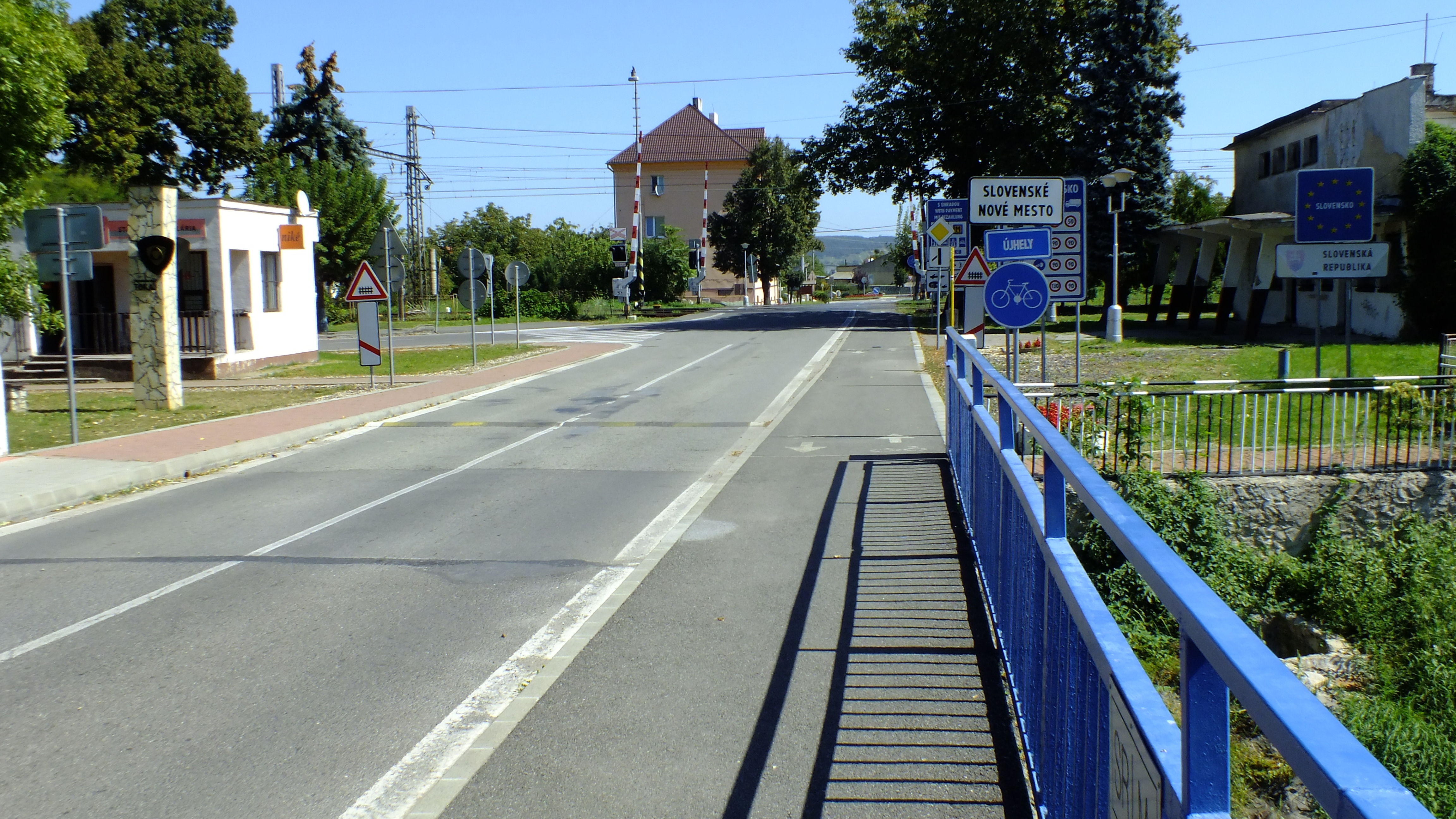 Slovenská státní hranice